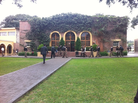 Markham College Pinchbeck Library